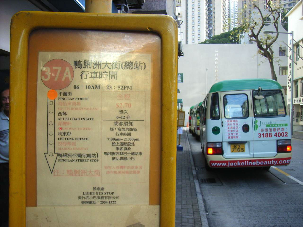 鴨脷洲大街 小巴總站